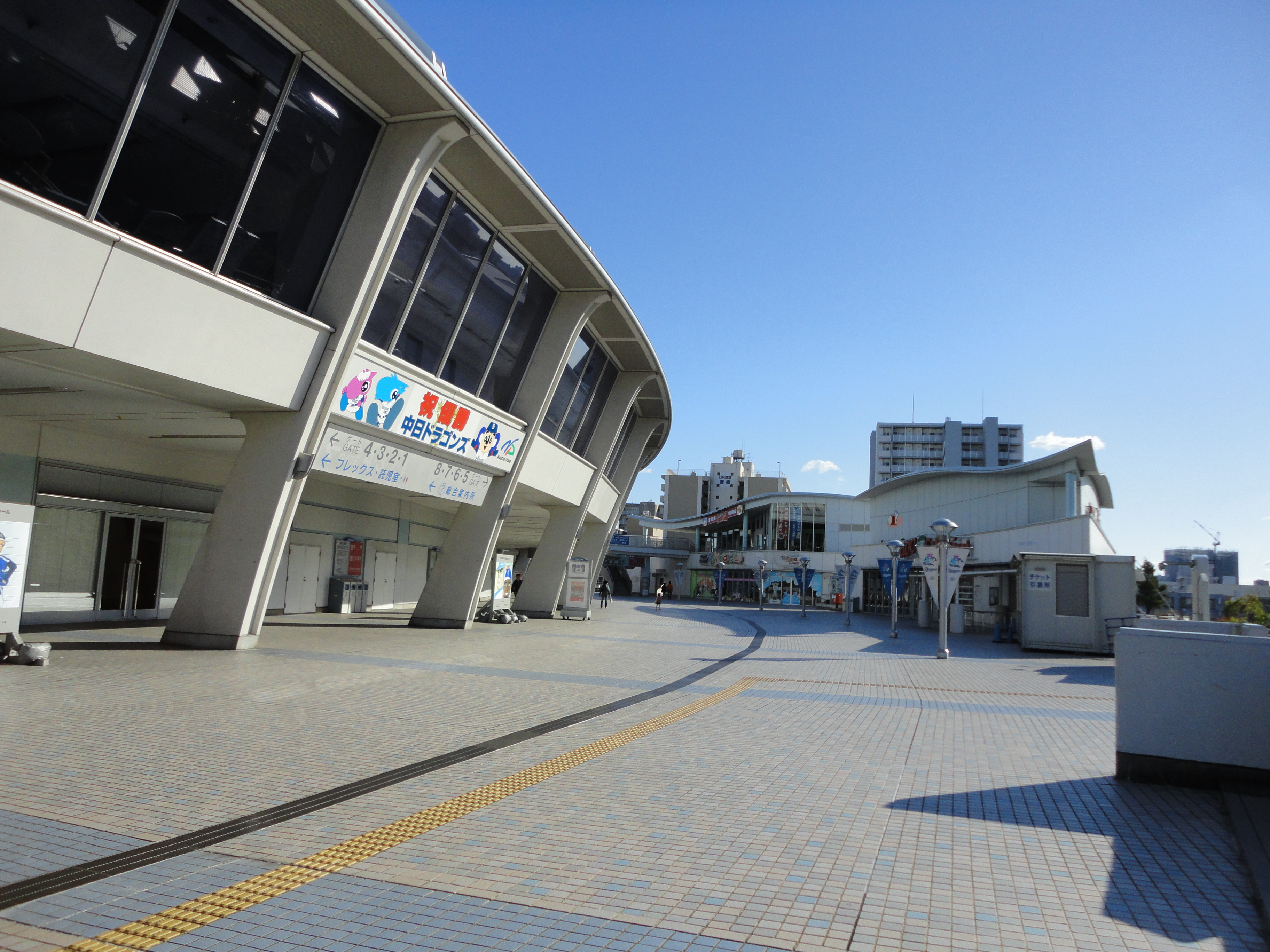 ナゴヤドーム